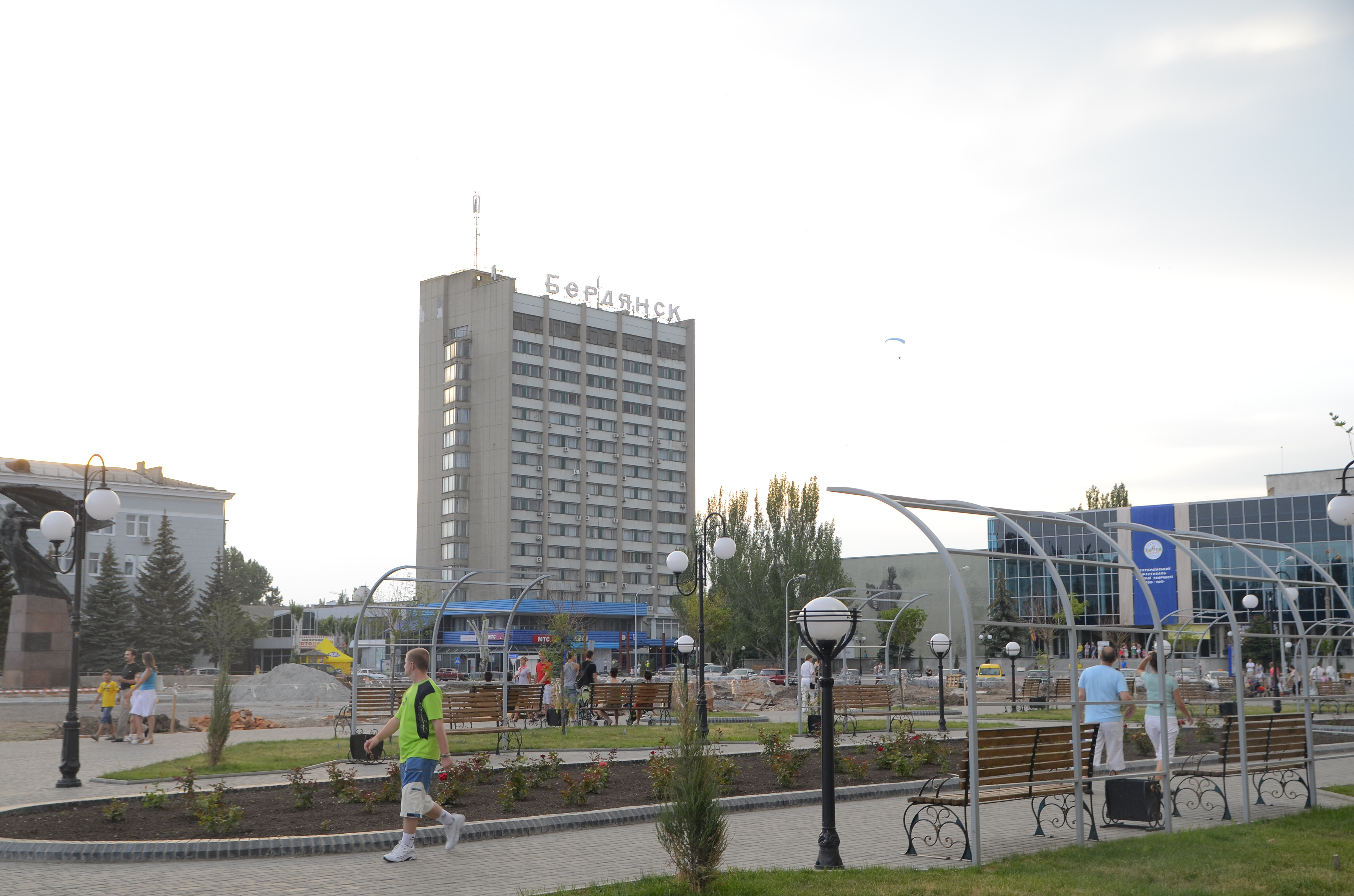 Бердянск